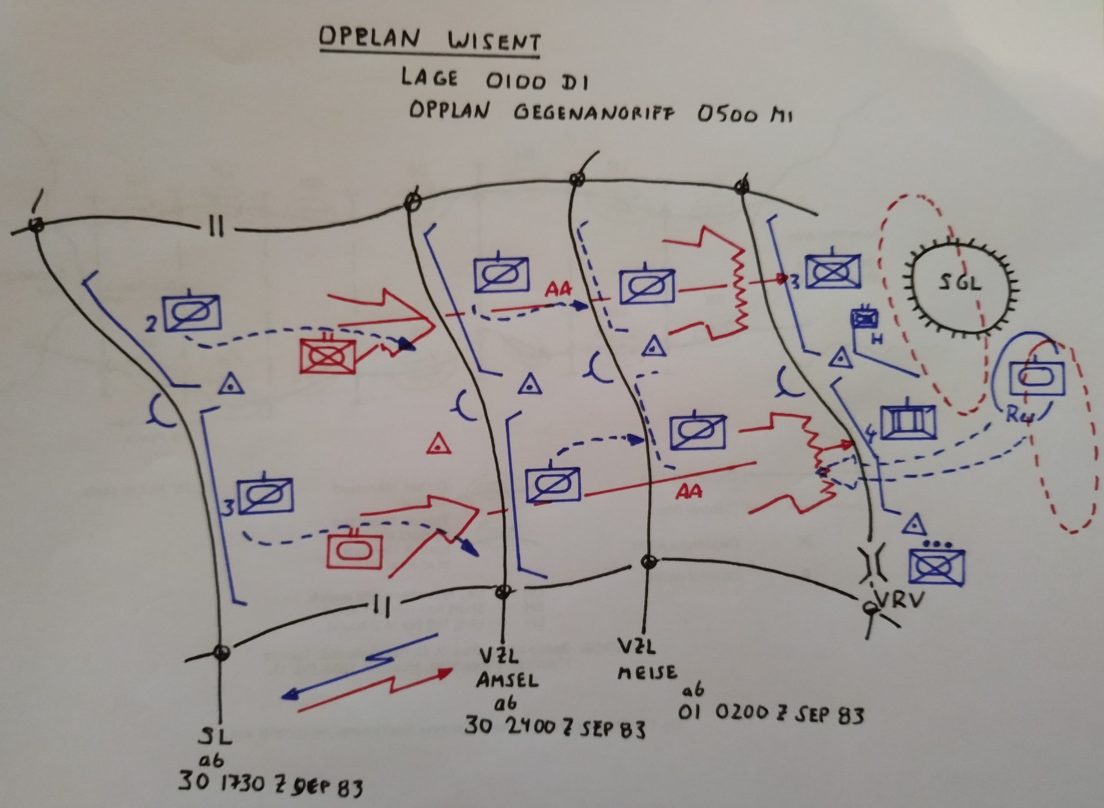 Operationsplan Wisent (exemplarisch). Beispielhafter OPPLAN.